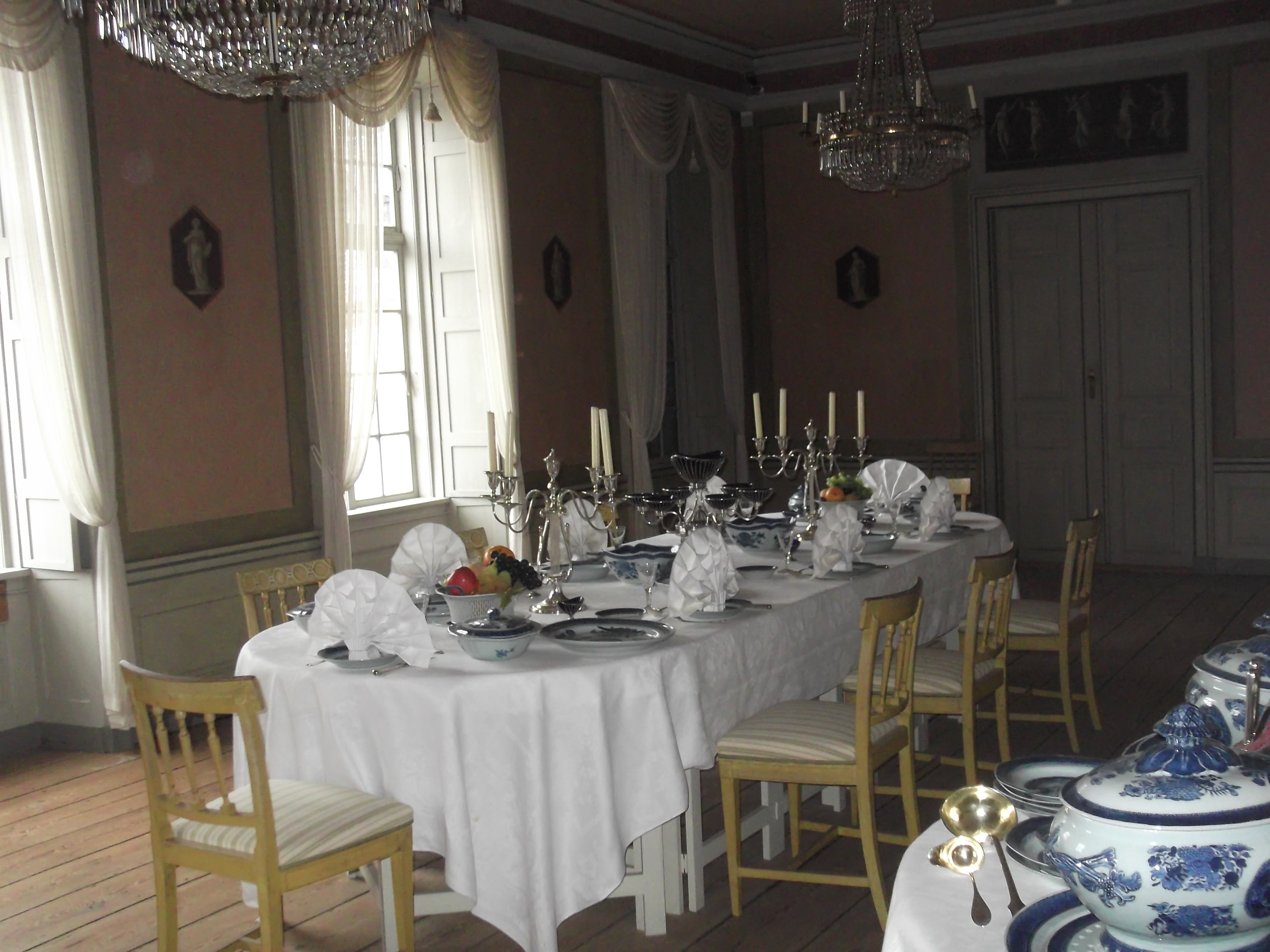 Borddækning i fin stue